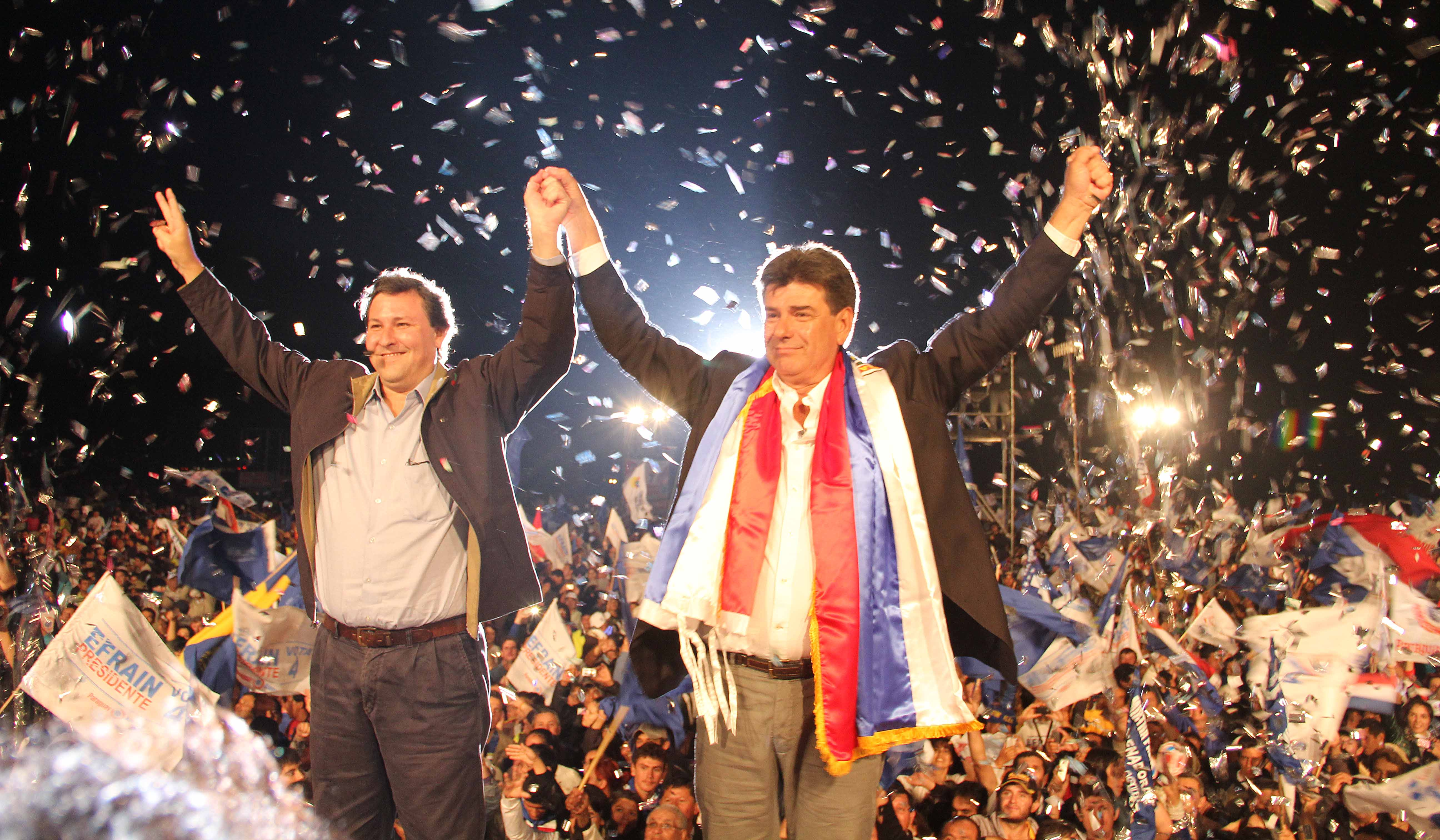 Campaña por la vicepresidencia año 2013